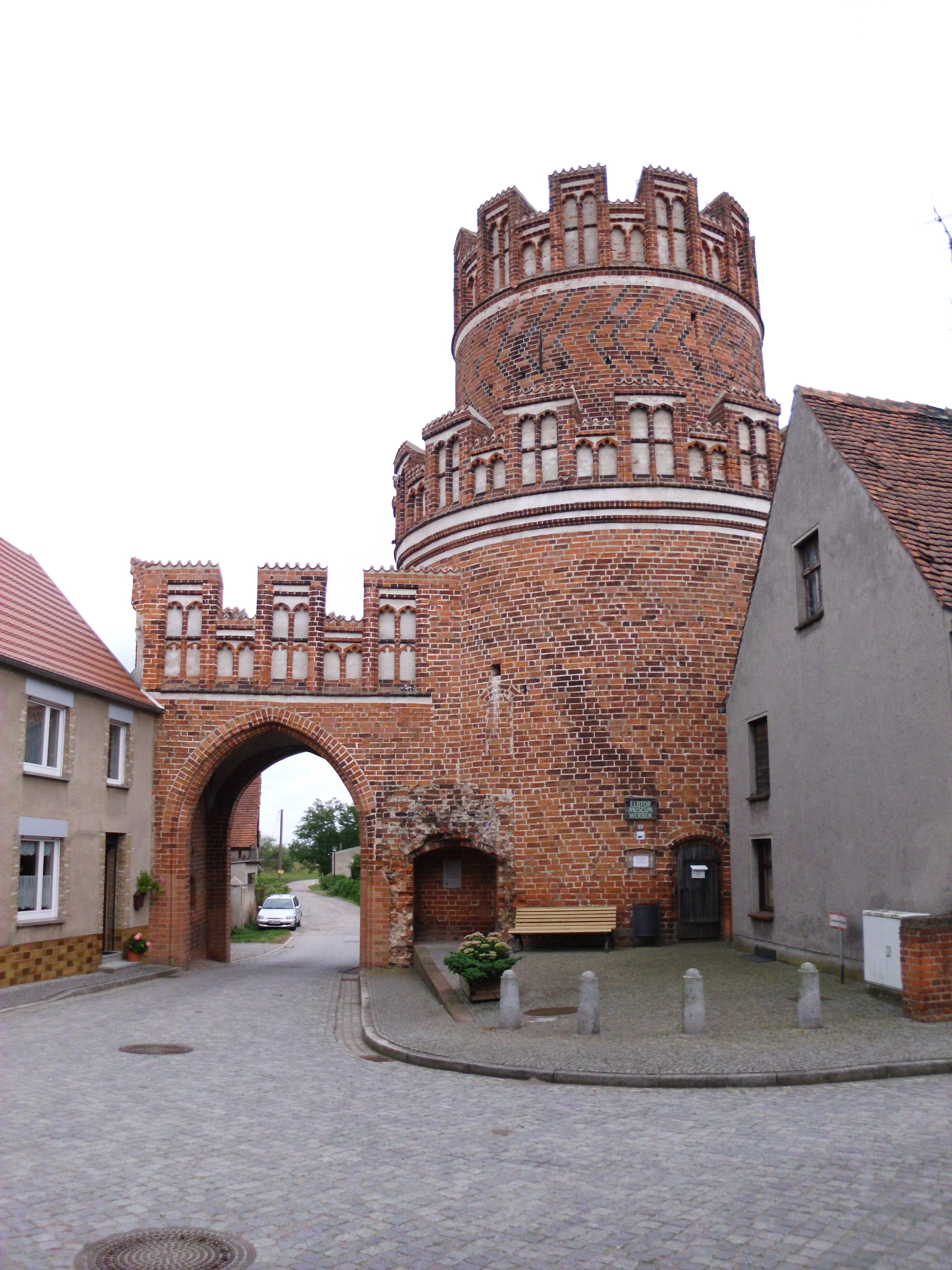 Elbtor in Werben